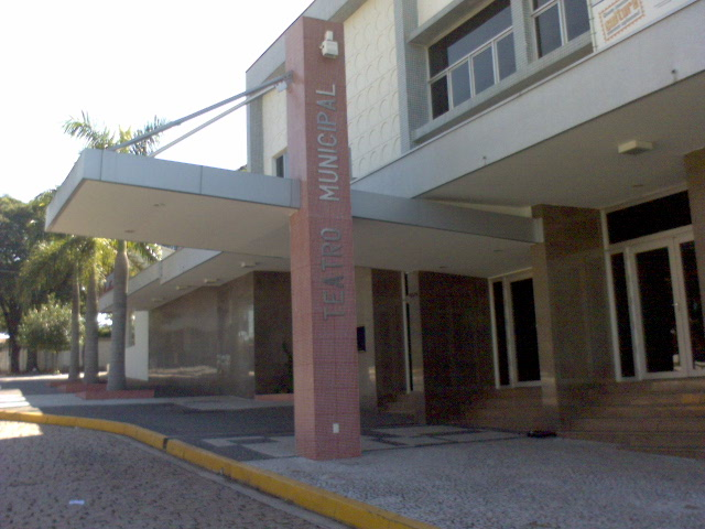 Teatro Municipal de Americana, São Paulo, Brasil